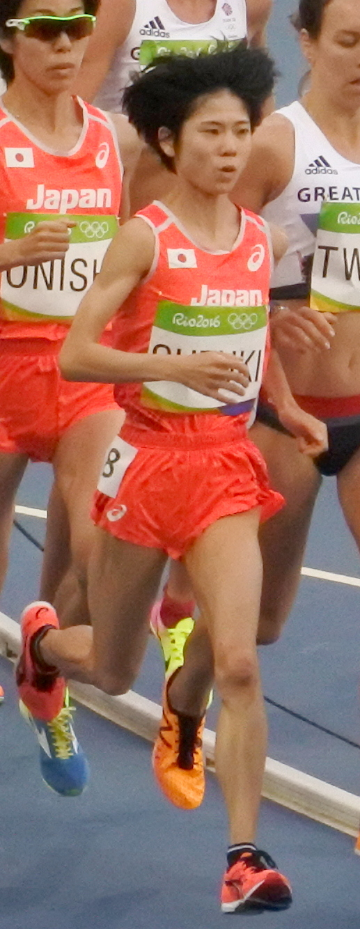 Rio 2016 - Eliminatórias 5000m Feminino